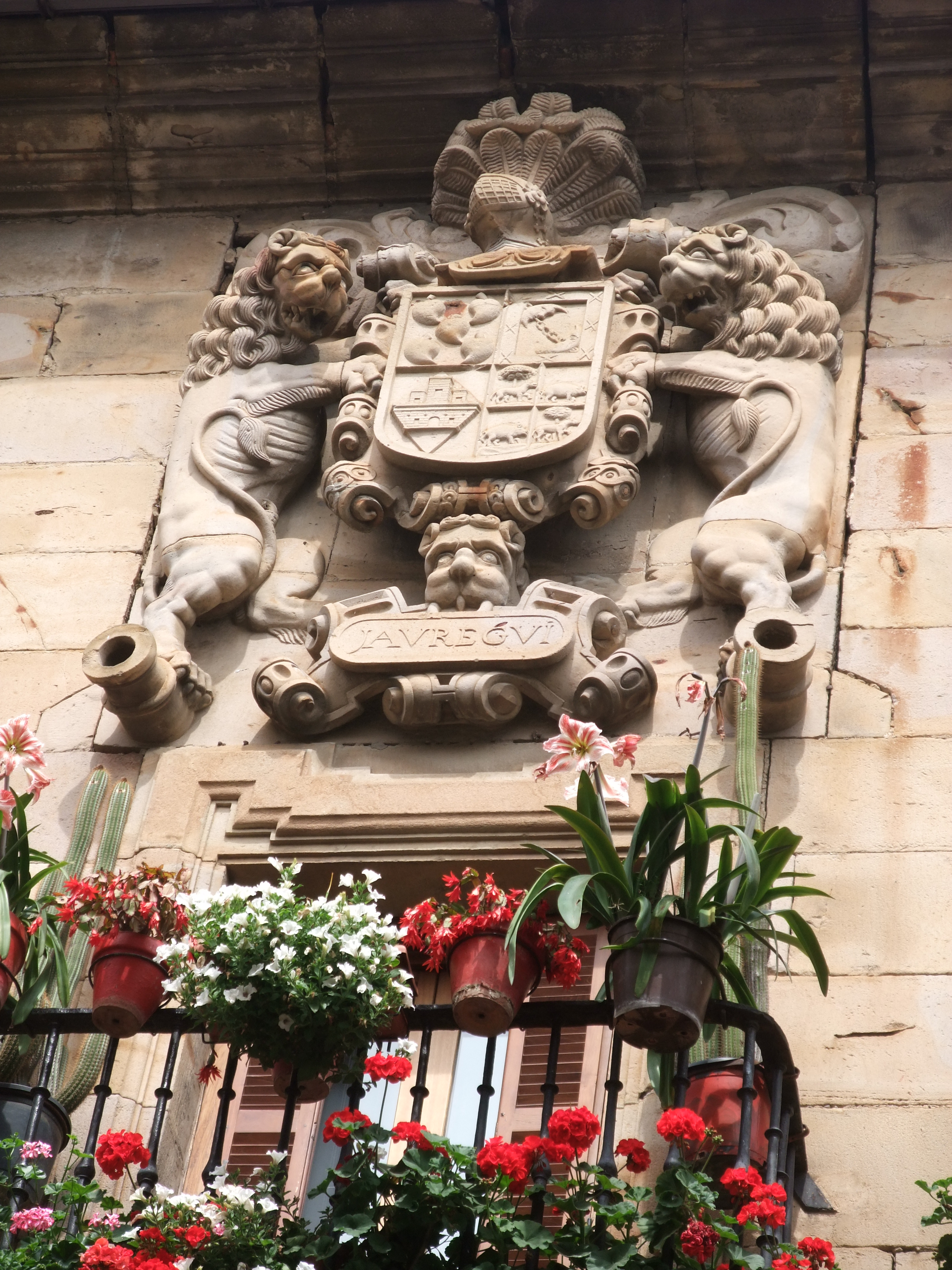 Segura (Guipúzcoa)-Palacio Jauregi-2